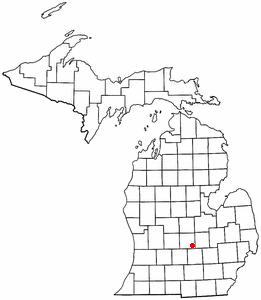 Map